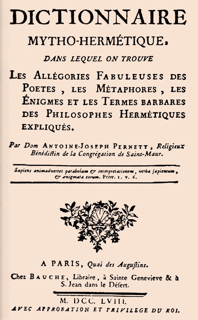 Frontispice de la page de garde du dictionnaire mytho-hermétique de Dom Pernety